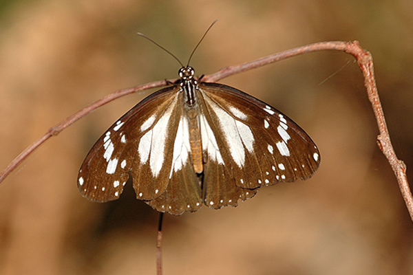 Swamp Tiger (Danaus affinis)